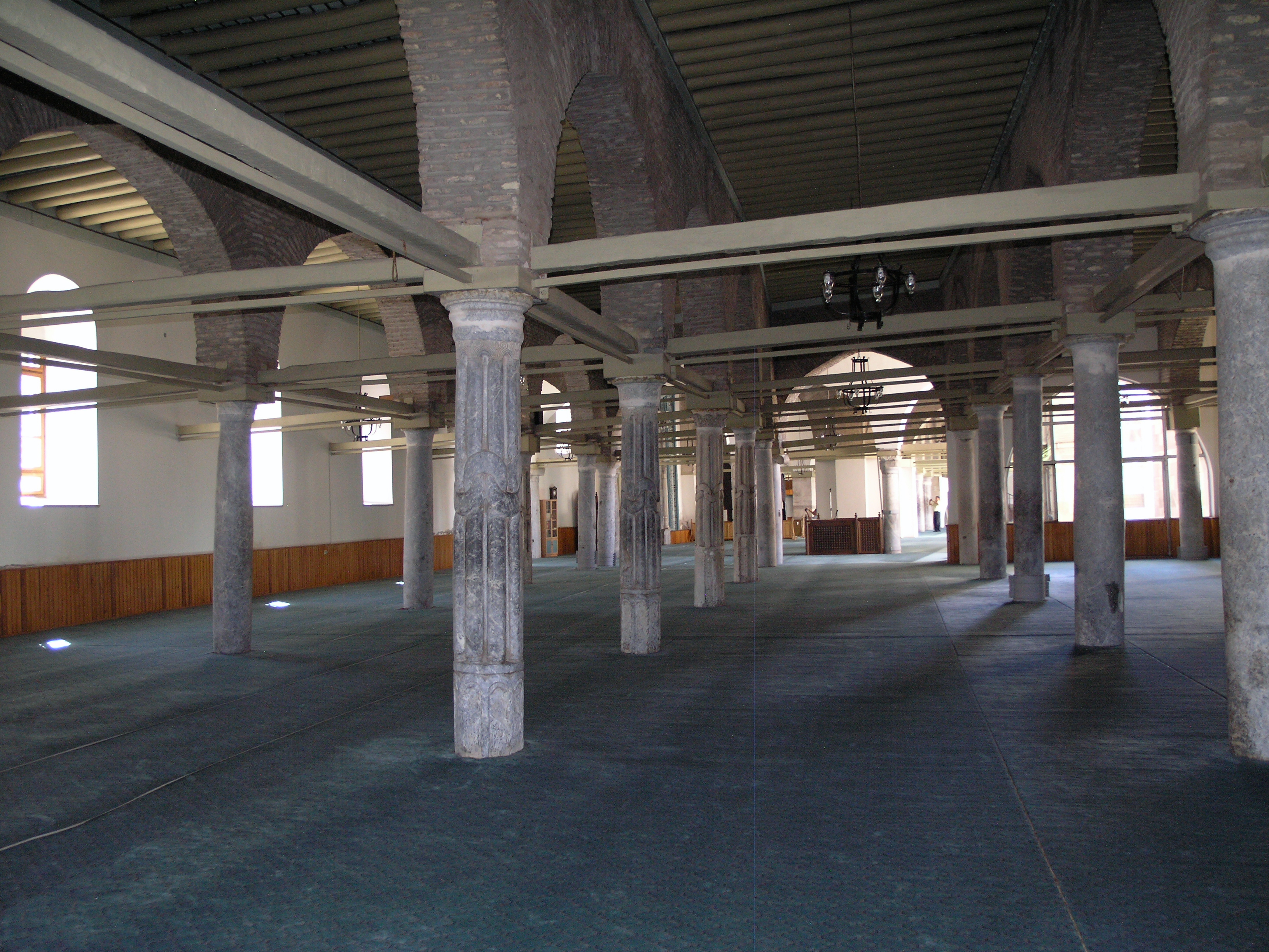 Турция, Конья – Мечеть Ала ад-Дина